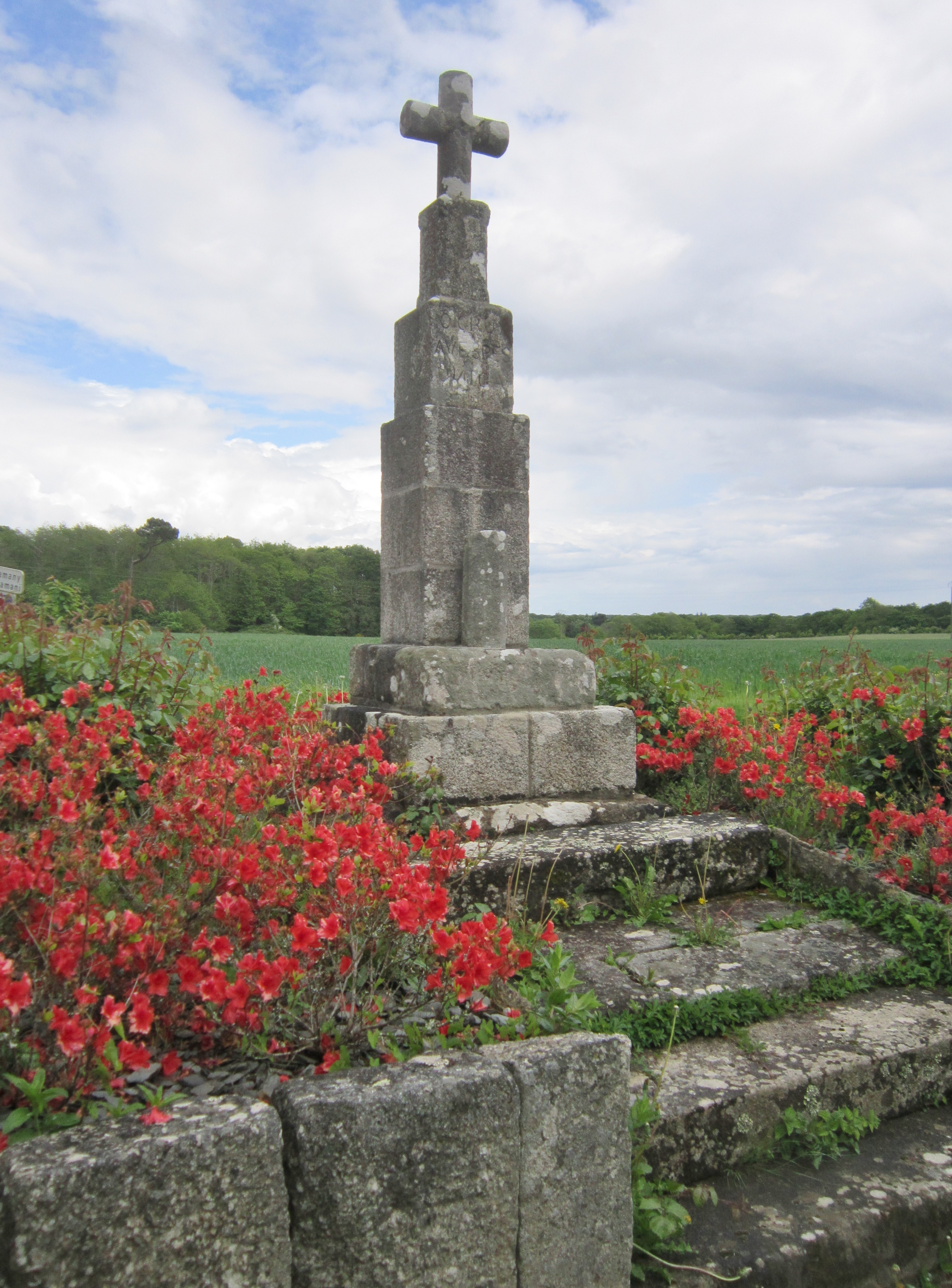 Moëlan-sur-Mer : la croix de Ty Groës, dite aussi de Kerandrège (début XXe siècle).